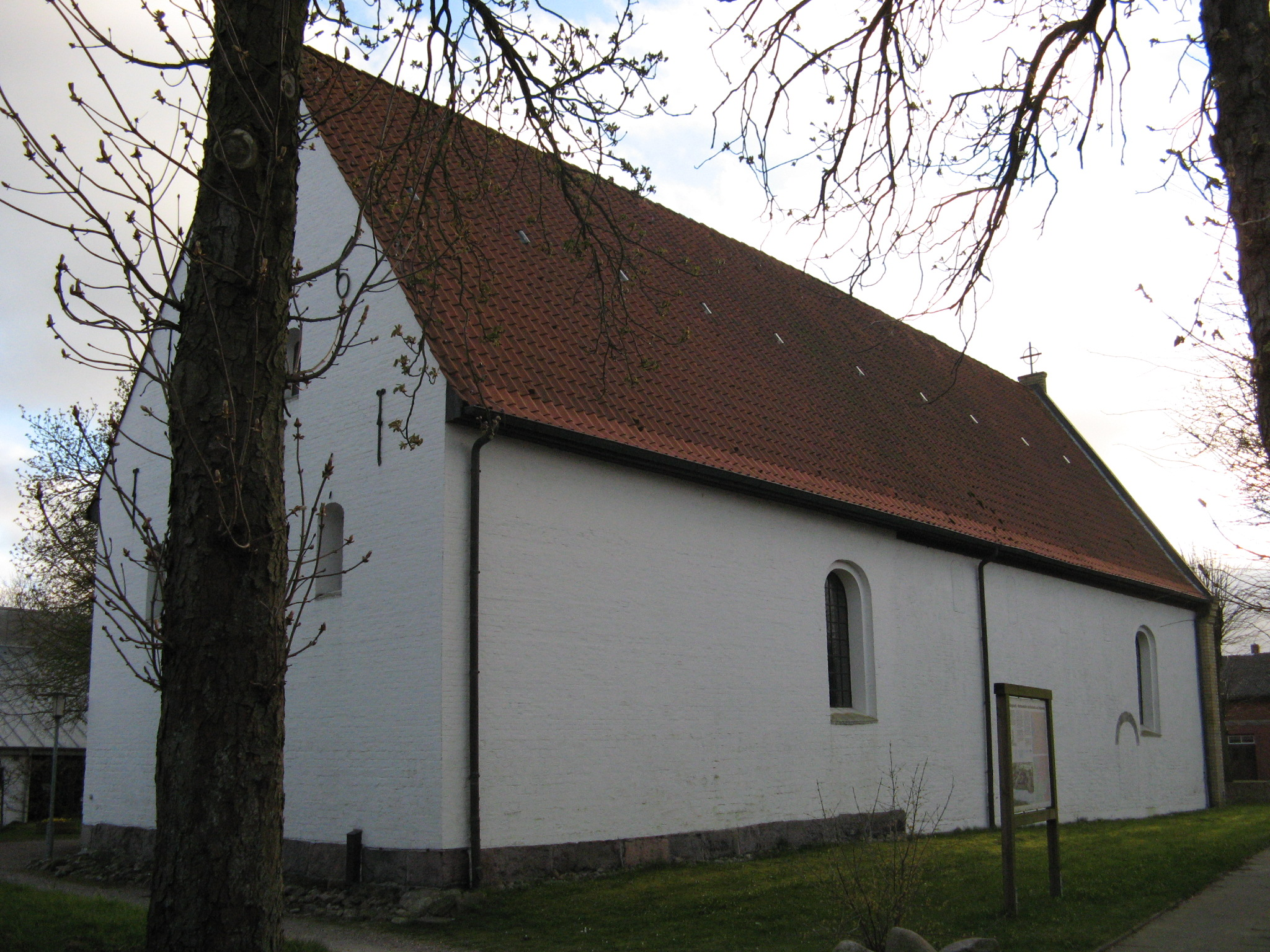 Church in Hollingstedt Author: Dirk Ingo Franke